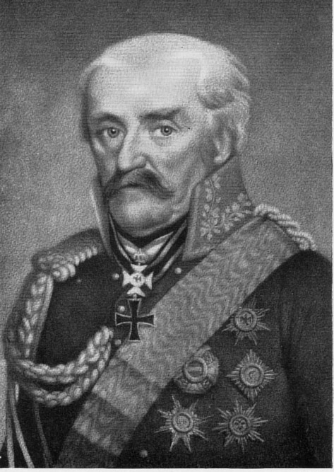 Fürst Blücher von Wahlstatt